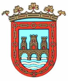 Escudo de Tudela (Navarra, España)